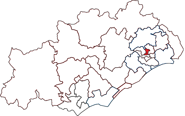 Situation du canton dans le département de l'Hérault